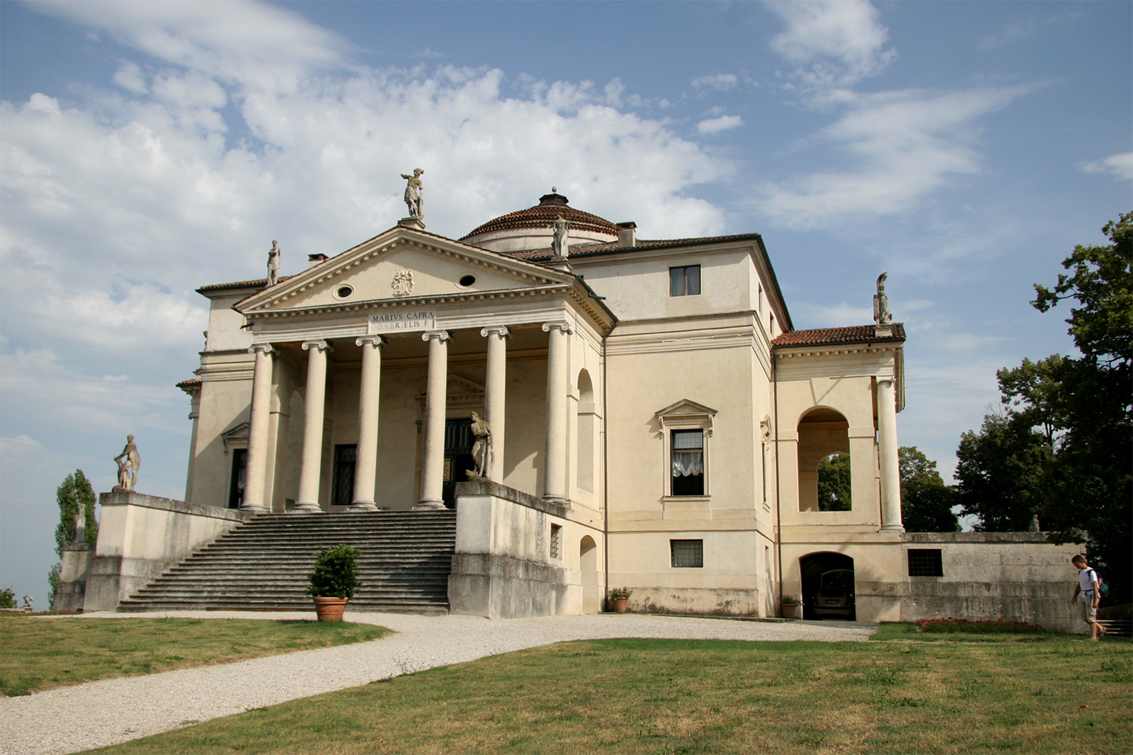 Villa Almerico Capra (La Rotonda), Vicenza, Italia.